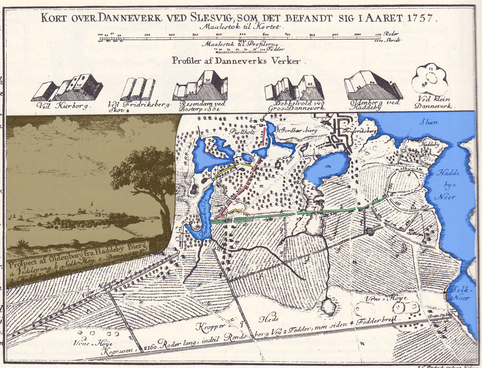 Karte des Danewerks von 1757 von Erik Pontoppidan